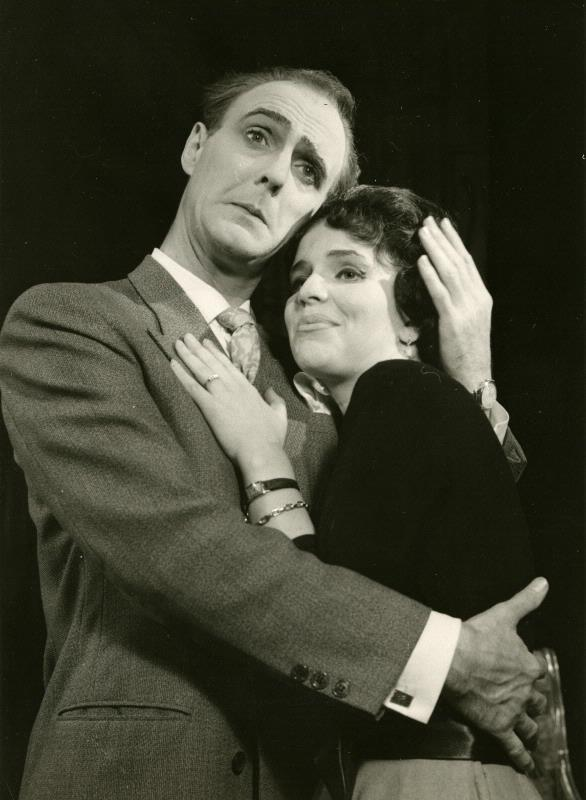 Caryna Houmann och Ragnar Thell i Den heliga ilskan på Helsingborgs stadsteater